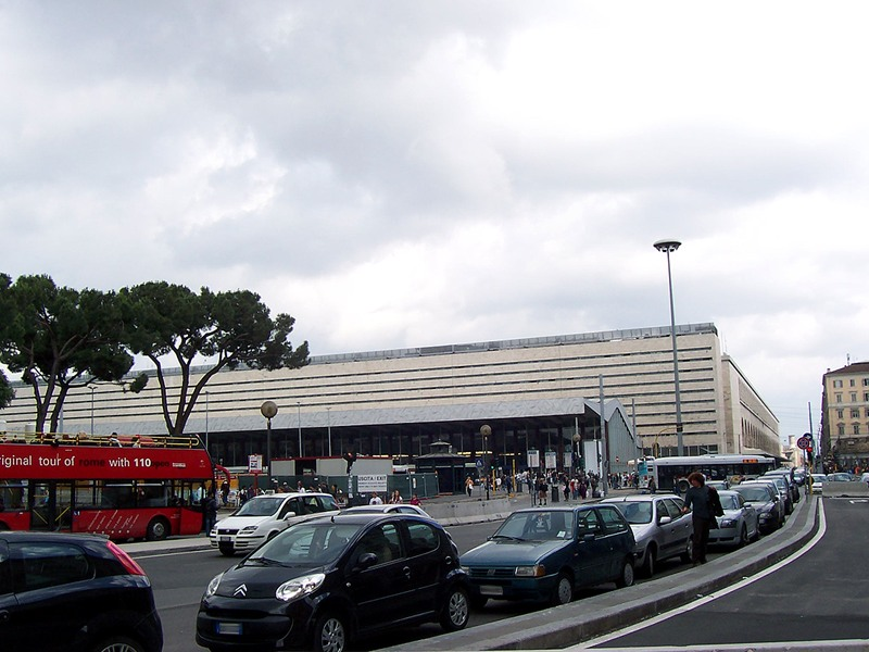 Roma - Stazione Termini